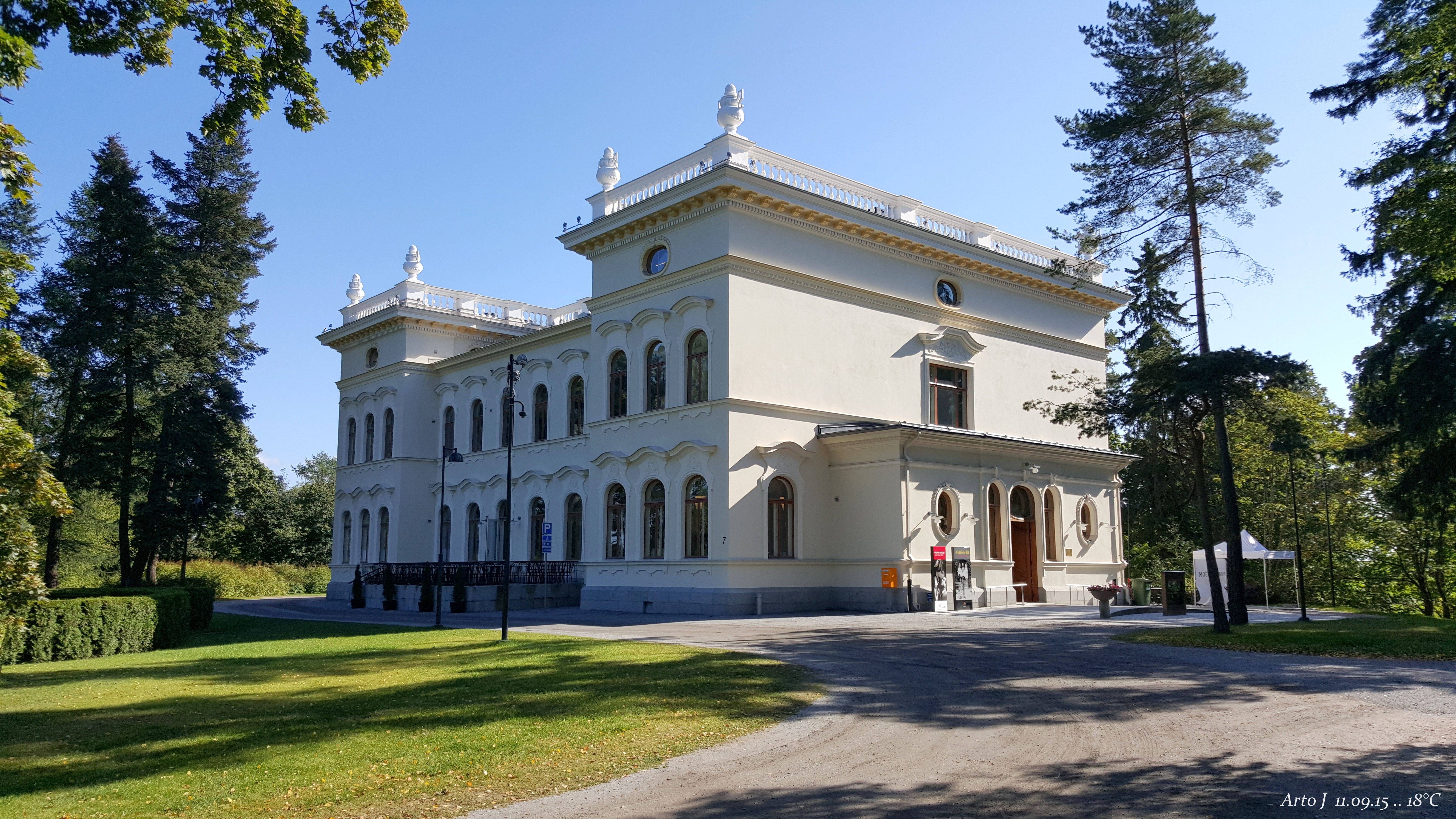 Tampere - Näsilinna